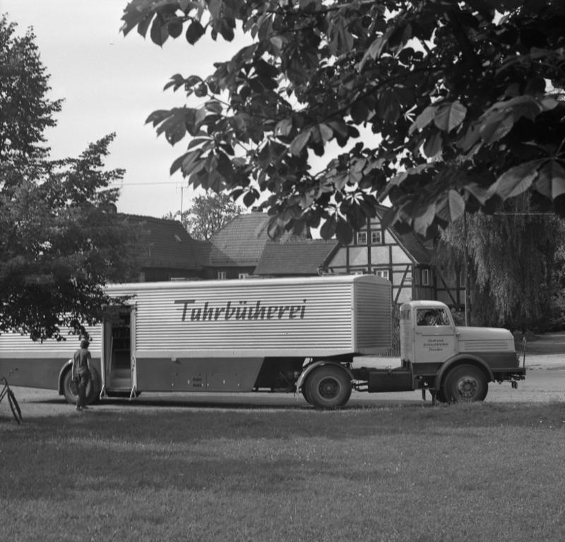 Dresden, Fahrbücherei Zentralbild/Häßler 4.9.70 Dresden: Bibliothek auf Rädern 7500 ständige Leser im Stadtgebiet von Dresden werden jährlich durch diese rollende Bücherei literarisch betreut.Seit einem Jahr sind zwei neue Fahrzeuge der Stadt- und Bezirksbibliothek Dresden im Einsatz. Jeweils 5000 Bücher kann ein Fahrzeug zu einem Standort mitnehmen. 30000 Bände stehen den Lesern der Bücherei insgesamt zur Verfügung.